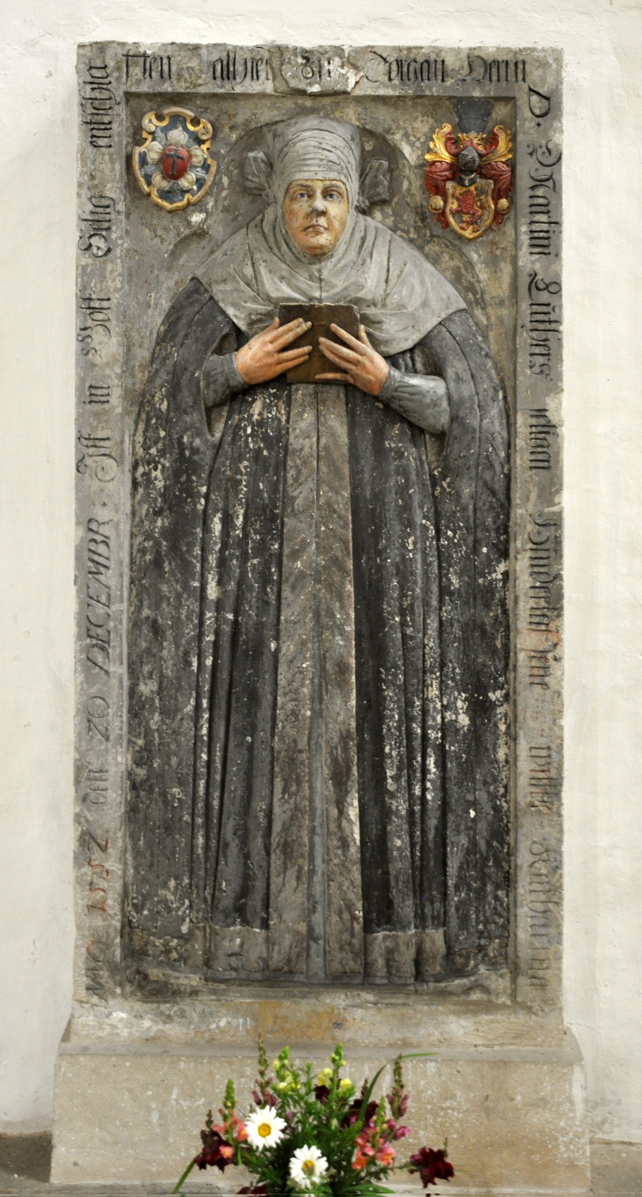 Torgau, Marienkirche, Epitaph der Katharina Luther, geb. von Bora